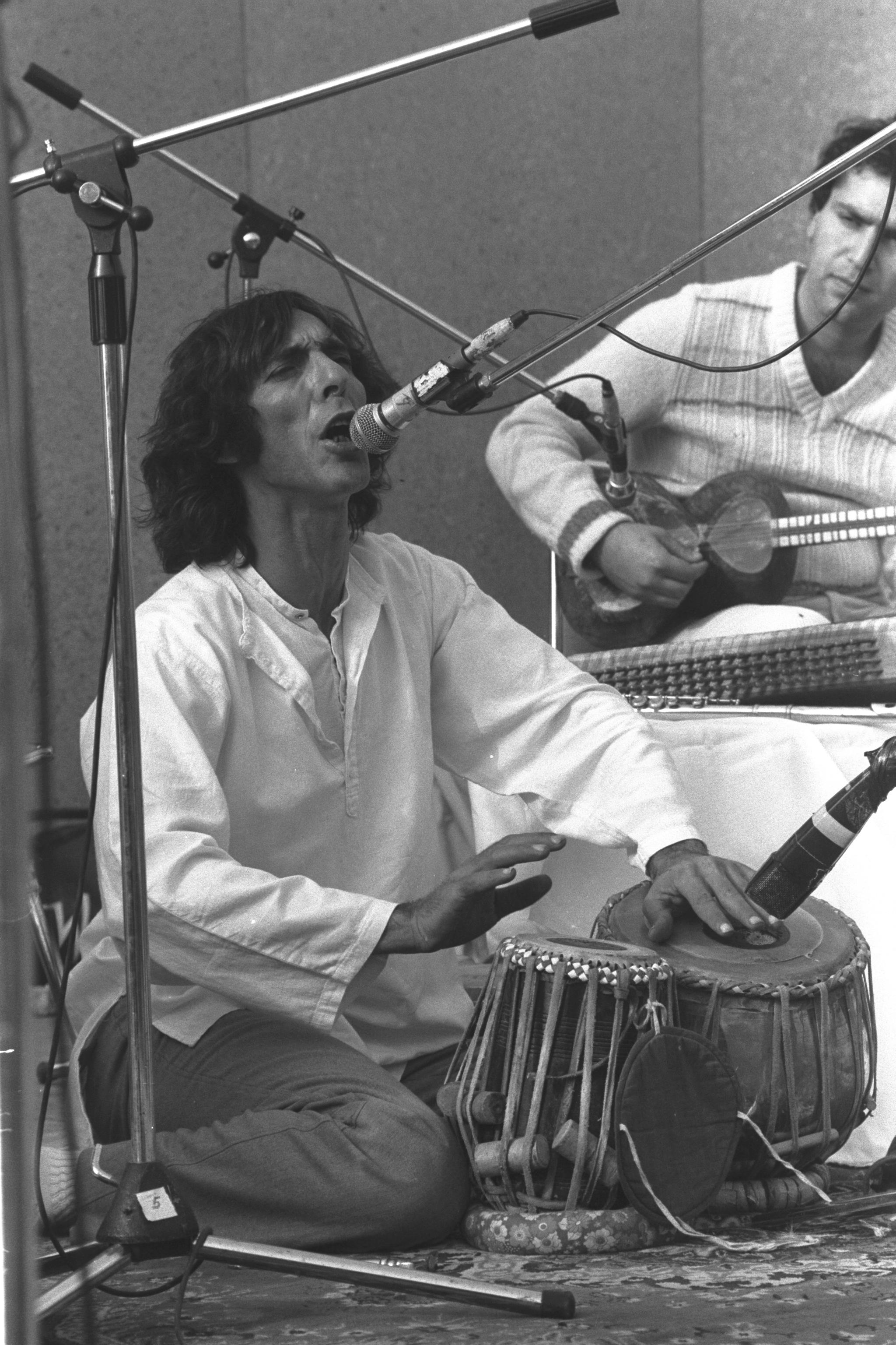 Singer Shlomo Bar performing at the Israel Peace Festival in Neve Shalom. שלמה בר מופיע בפסטיבל ישראל לשלום בנווה שלום Photo: HERMAN CHANANIA.